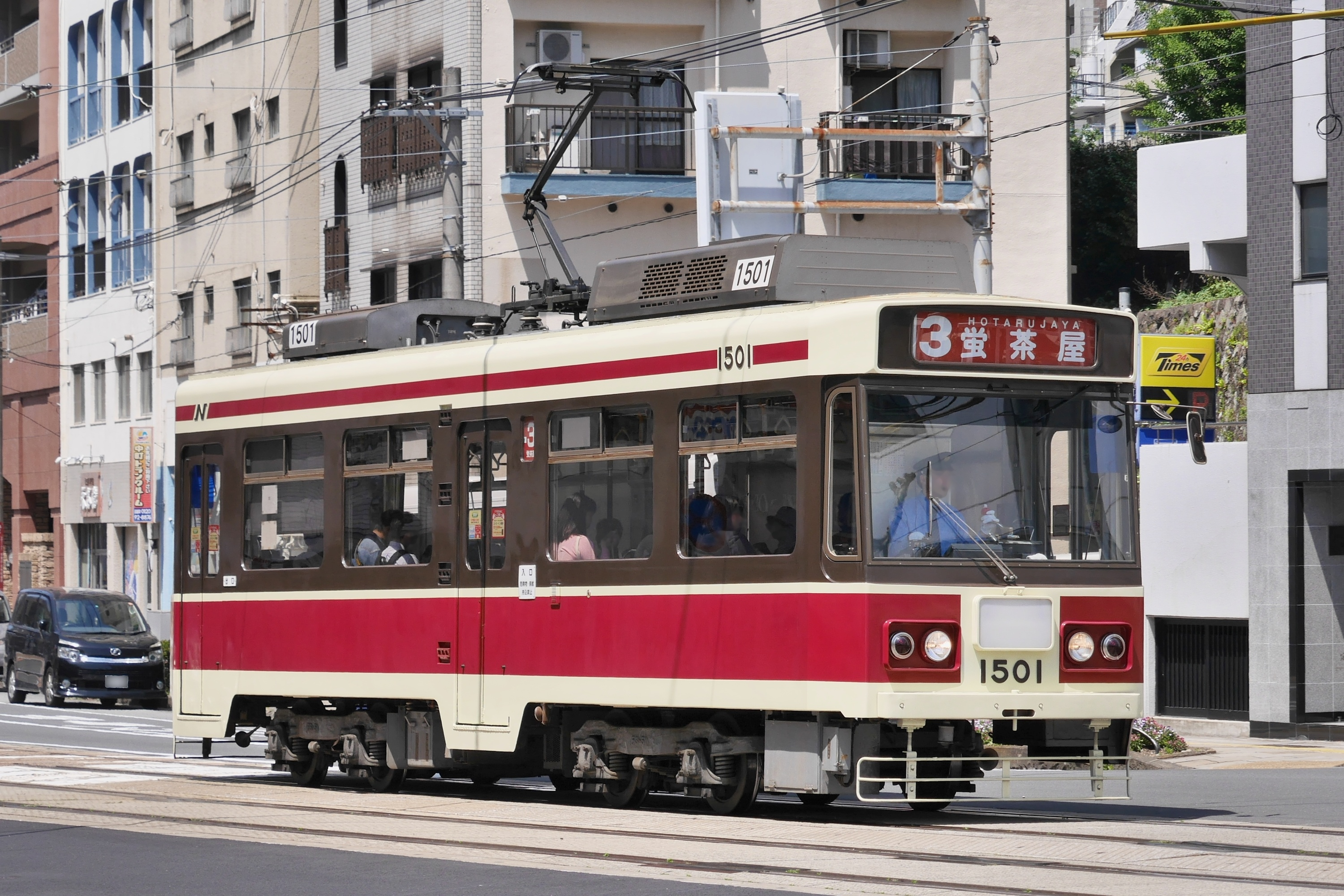 長崎電気軌道の路面電車車両1500形1501号。